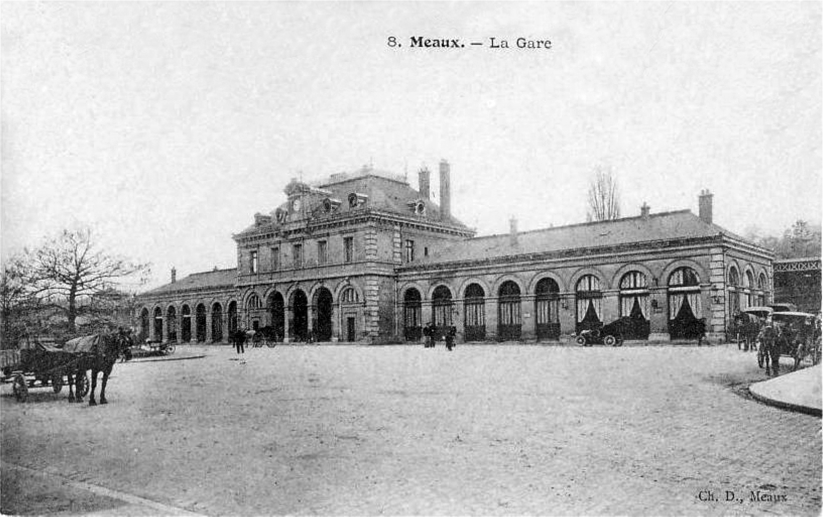 Le bâtiment voyageurs de la gare de Meaux vue de la place, au début des années 1900.